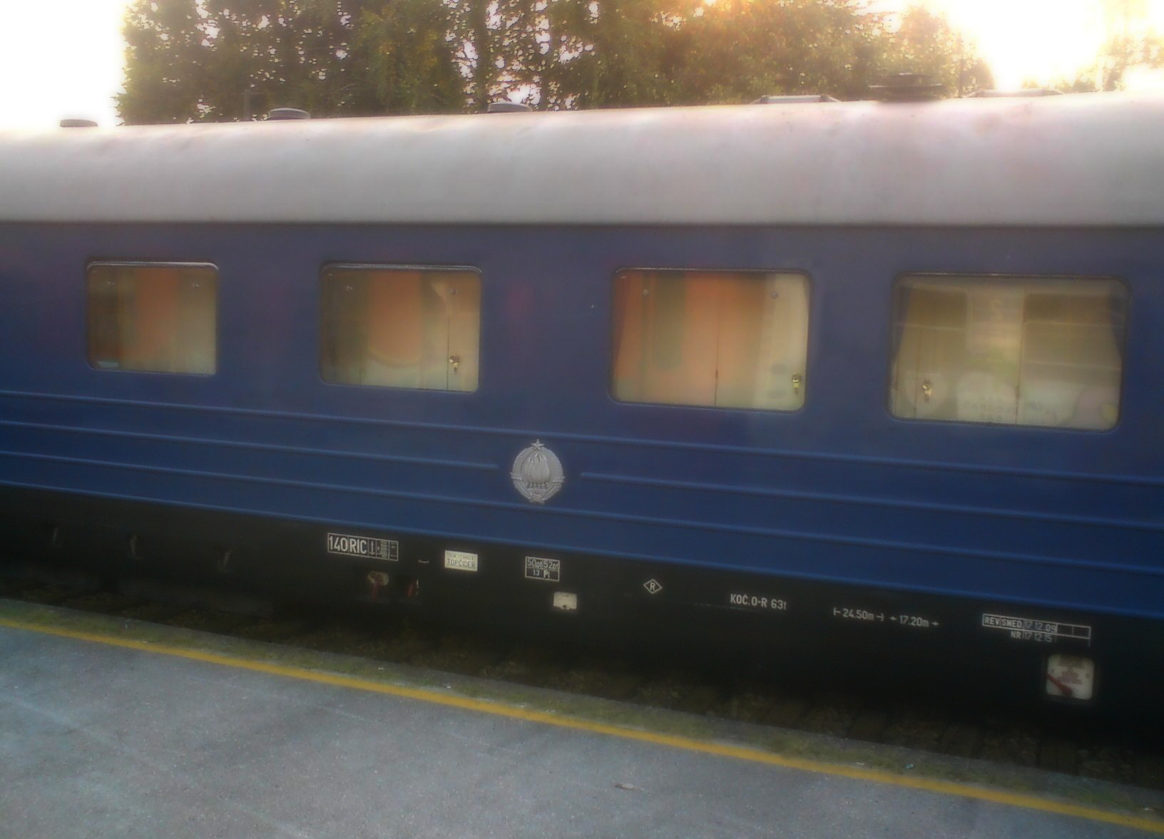 Плави воз